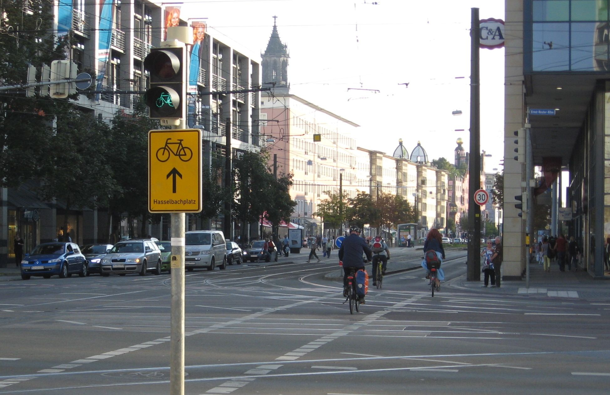 Fahrradwegweiser zum Hasselbachplatz in Magdeburg an der Kreuzung Ernst-Reuter-Allee/Breiter Weg